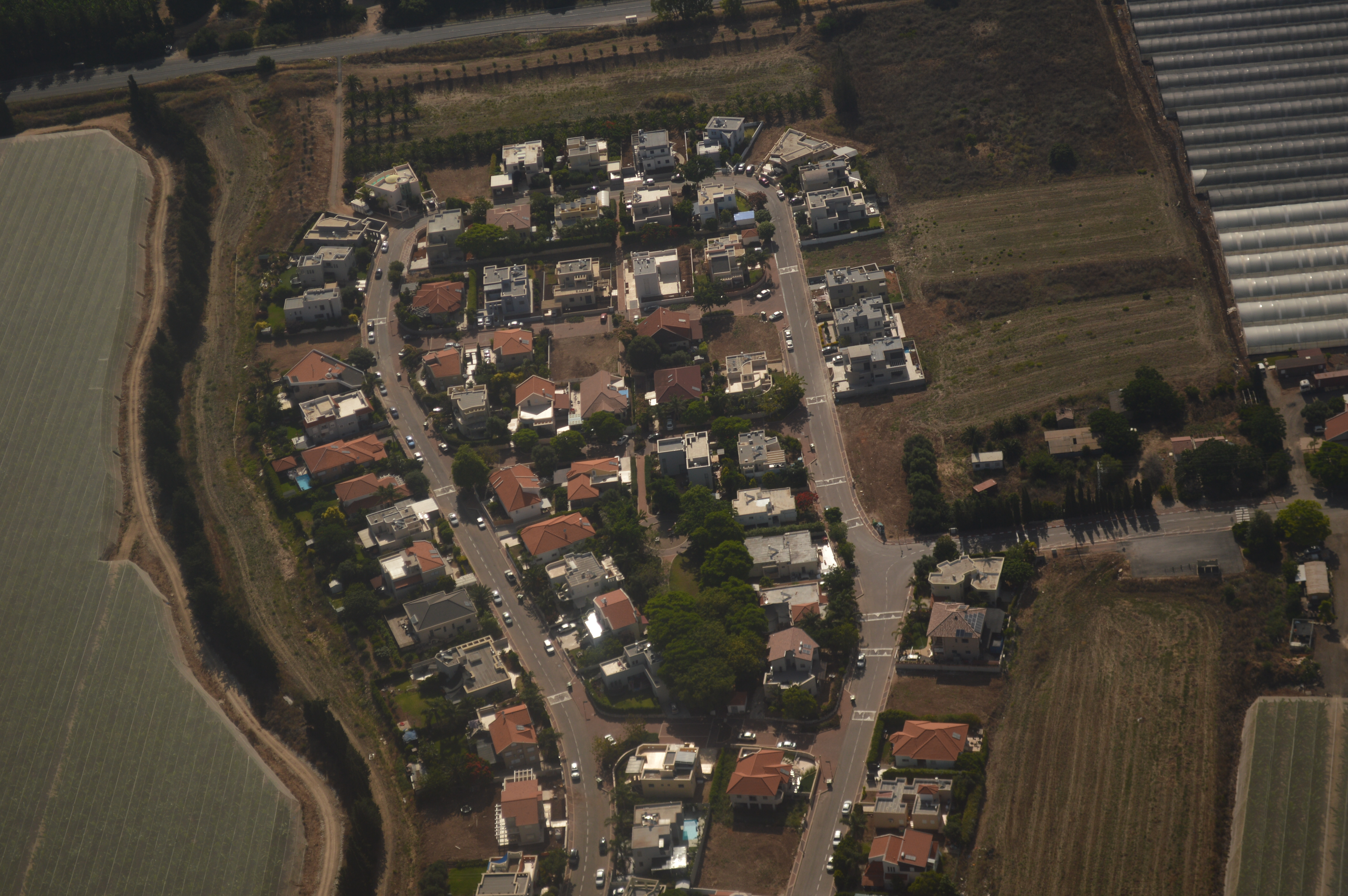 צילום אוויר של בתים במגדים